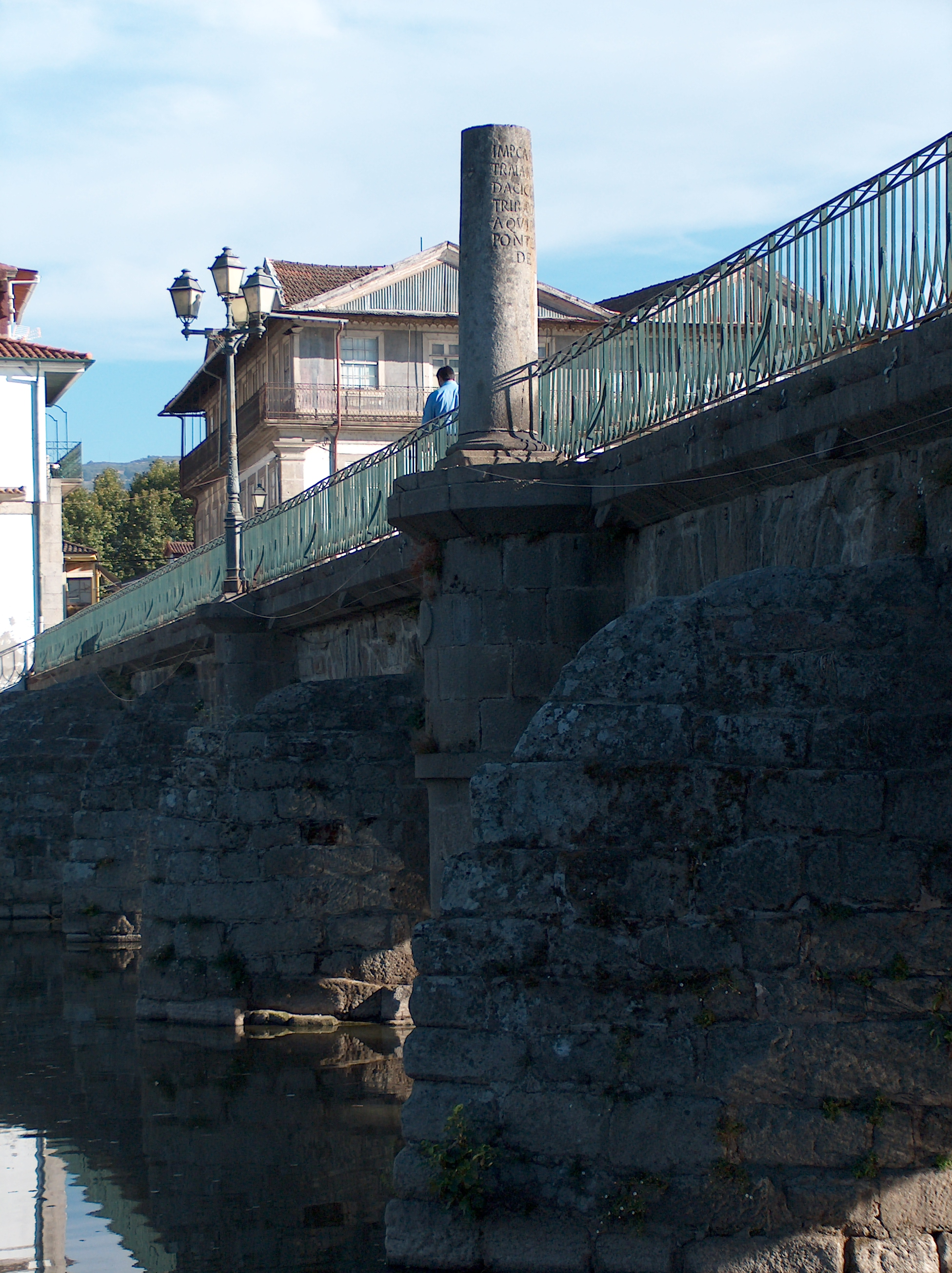 Ponte romana e as duas colunas comemorativas do tempo dos imperadores Vespasiano e Trajano